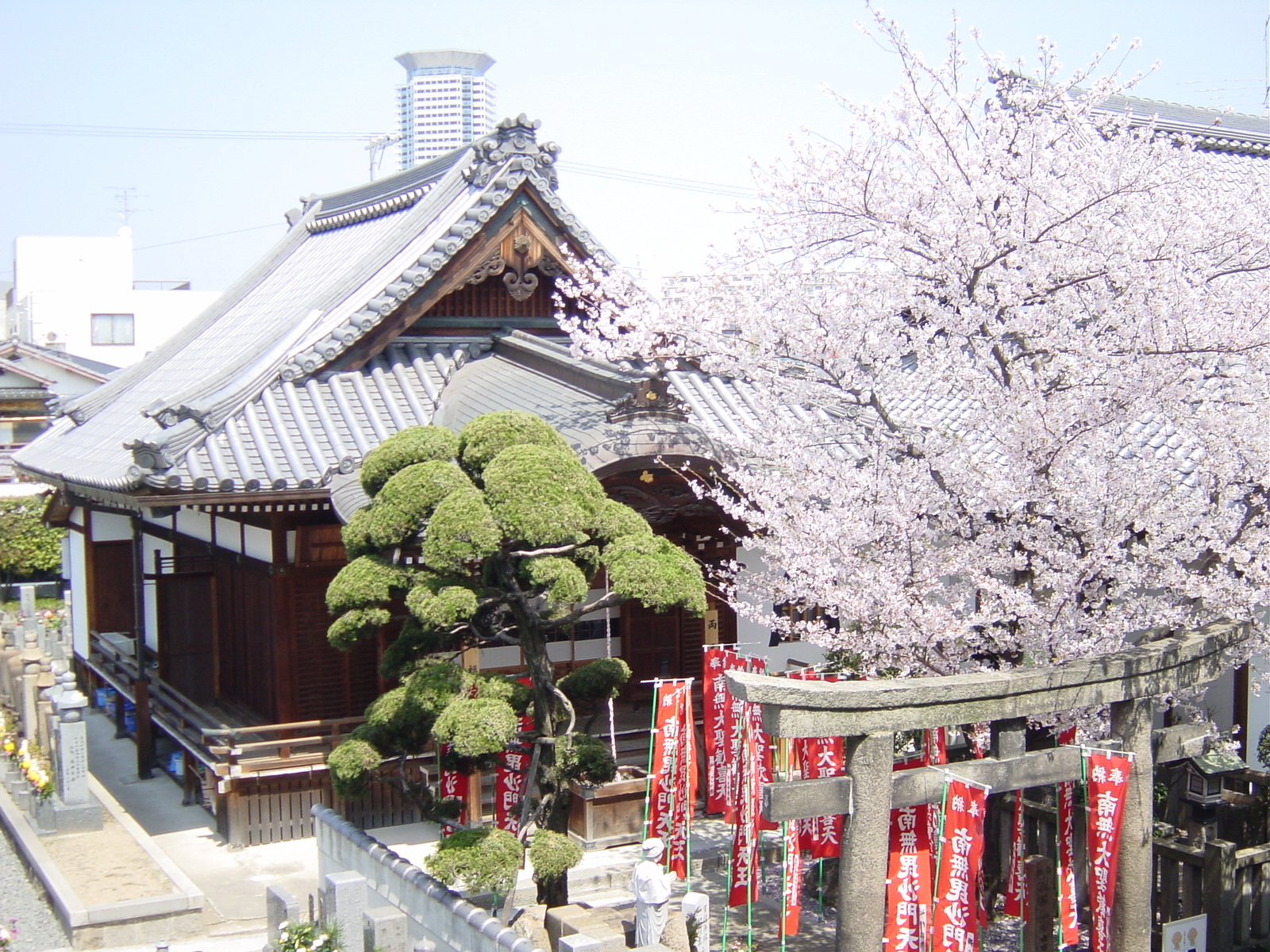 七福神と歓喜天と毘沙門天が本尊。厄除け祈願や安産祈願のお堂。年始には厄除けの方、戌の日には安産祈願の方が多数参拝。